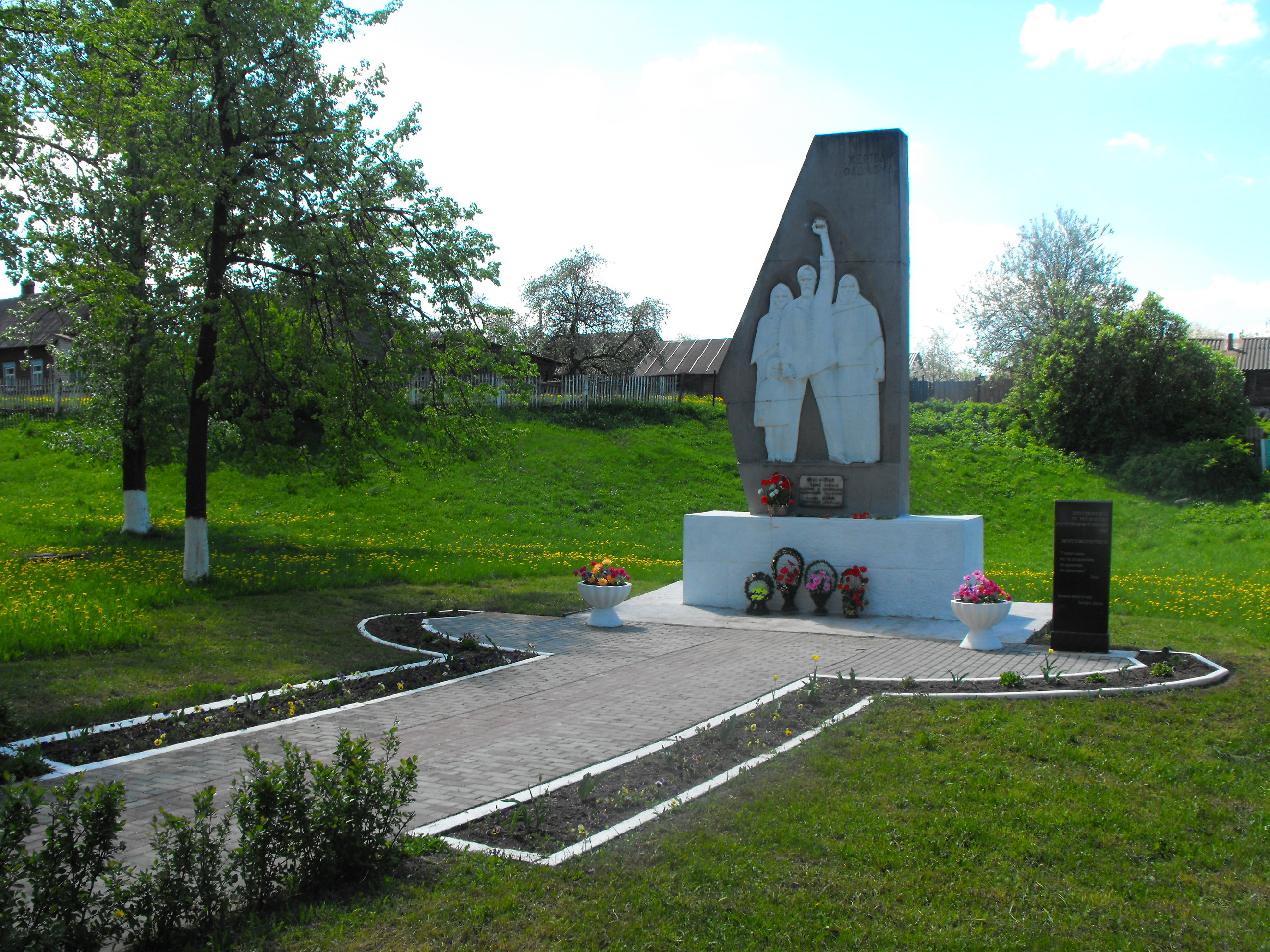 Мемориал на месте бывшего песчаного карьера в Докшицах по улице Маяковского (напротив мемориального еврейского кладбища), ставшего местом массовых убийств нескольких тысяч евреев - узников Докшицкого гетто во время Второй мировой войны.